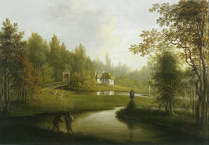 Johanneslyst, 1815 - Jævnfør Anne Christiansen i Sanderumgaards Romantiske Have, 2010, side 115 Om bogen, der blev udgivet i forbindelse med en udstilling efter havens restaurering og genåbning